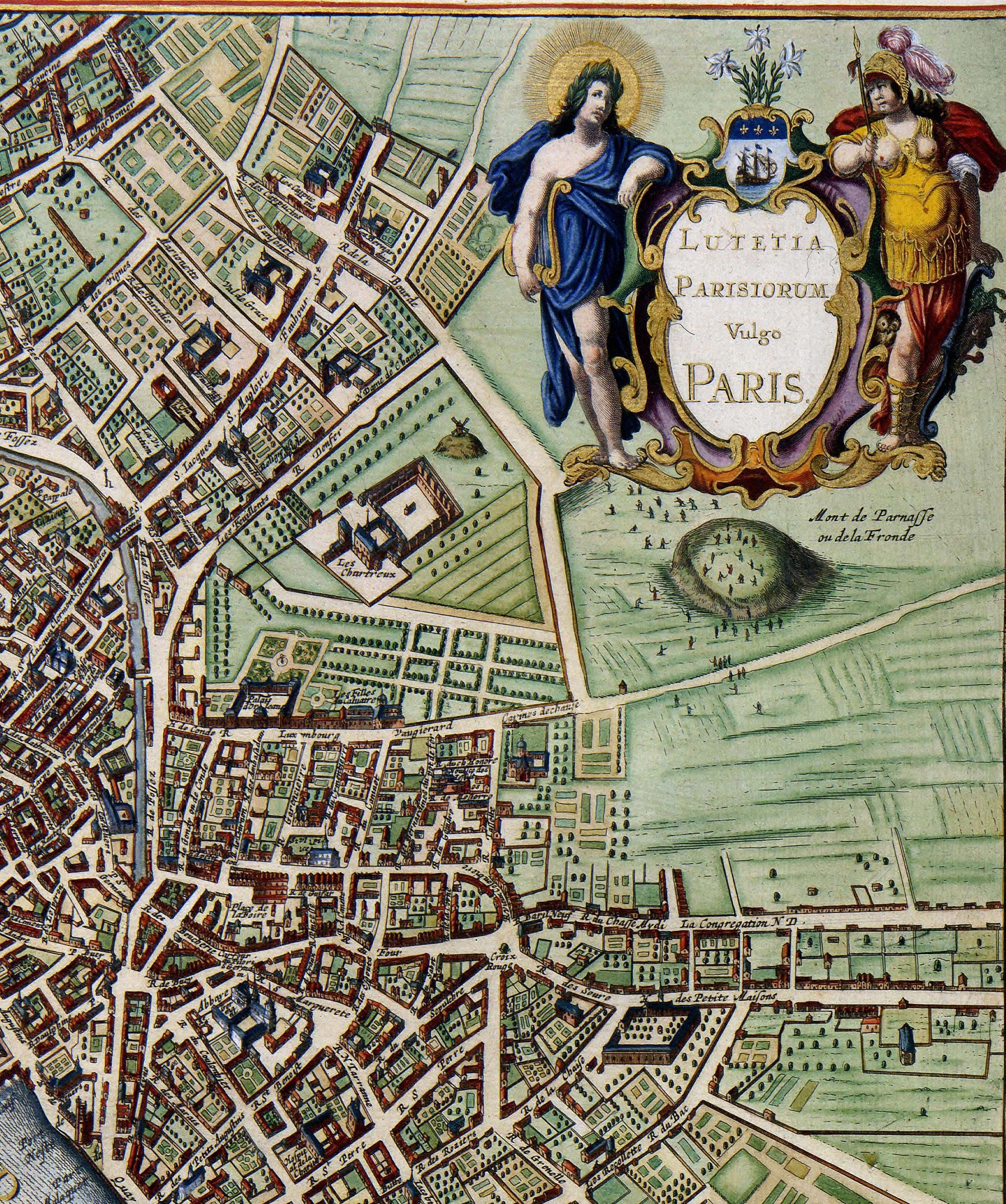 Lutetia Parisorium Vulgo, carte de Paris en 1657 (détail). Mont de Parnasse ou Mont de la Fronde.